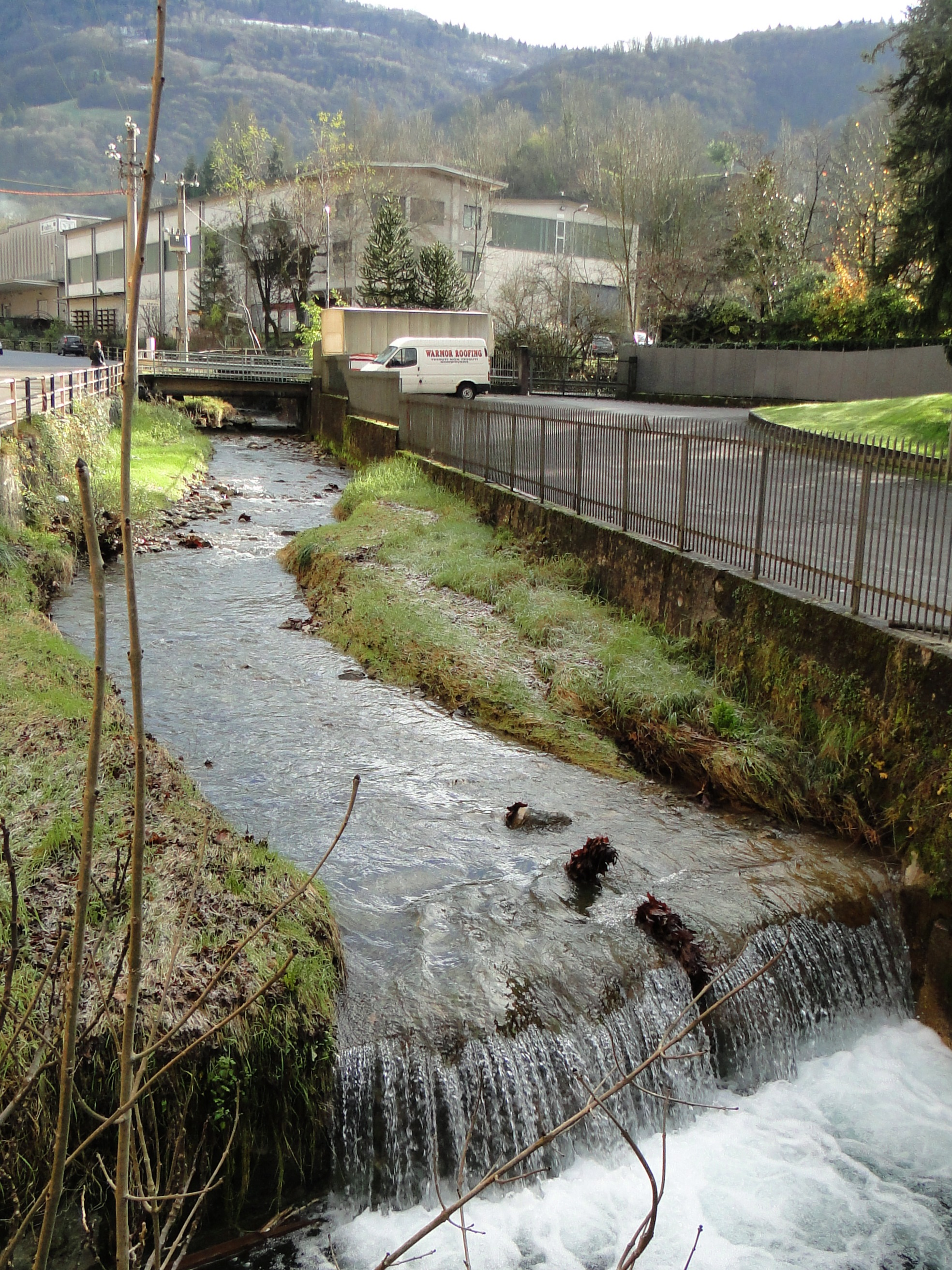 Torrente Rino. Leffe (BG). Italy